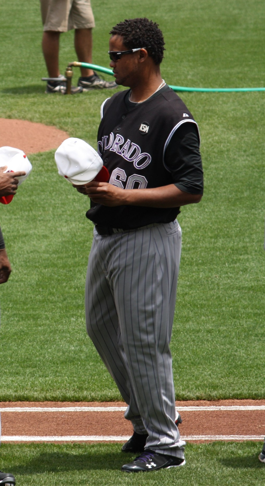 Manuel Corpas